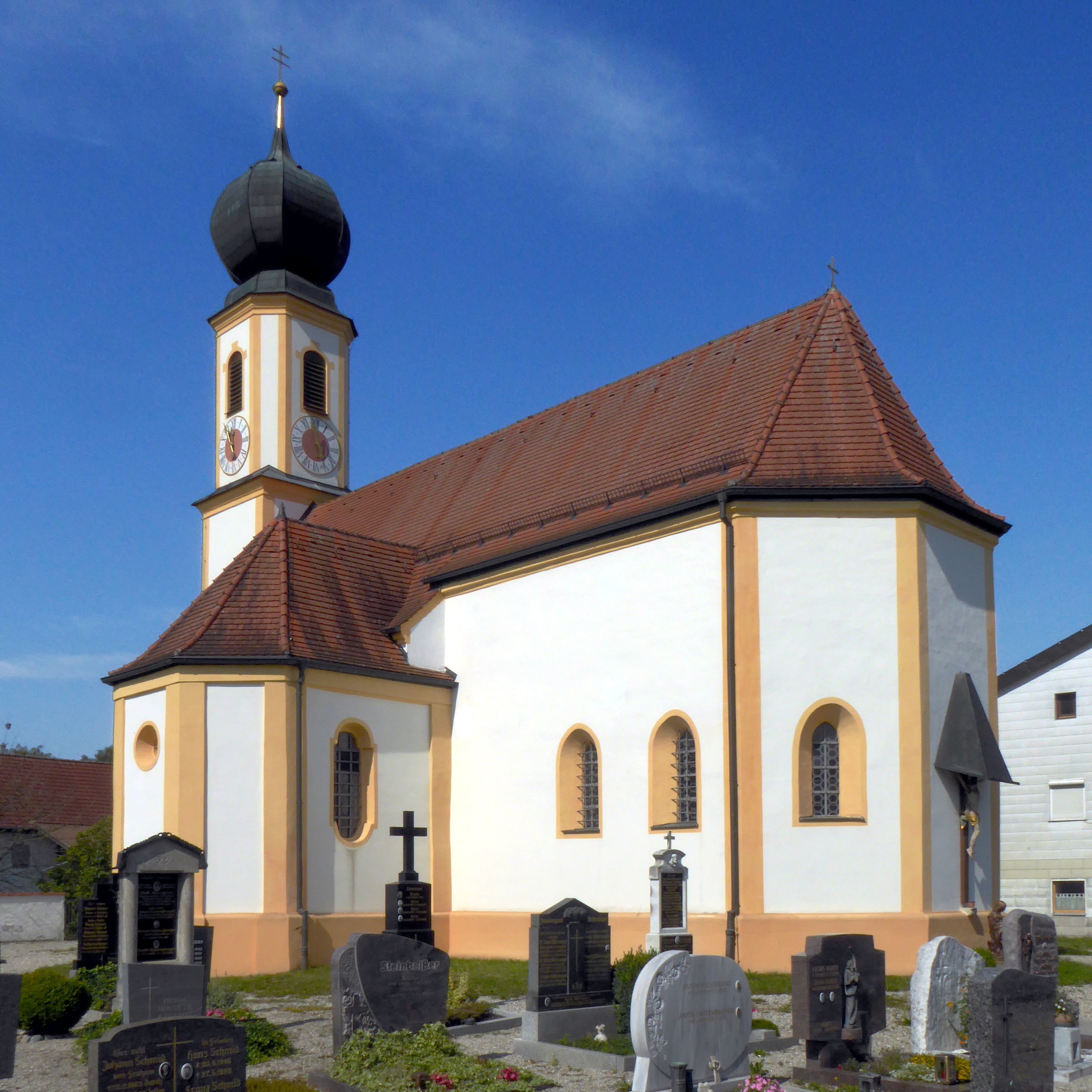 Kirche Sankt Martin in Fraham am Inn, in der Gemeinde Aschau.